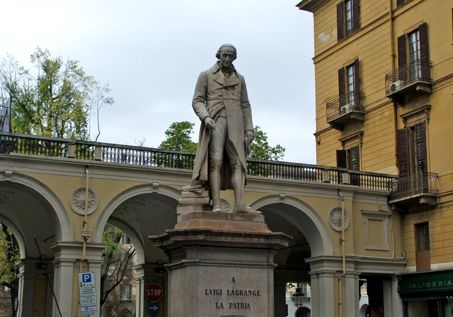 Statua a Luigi Lagrange - Via Lagrange - Torino